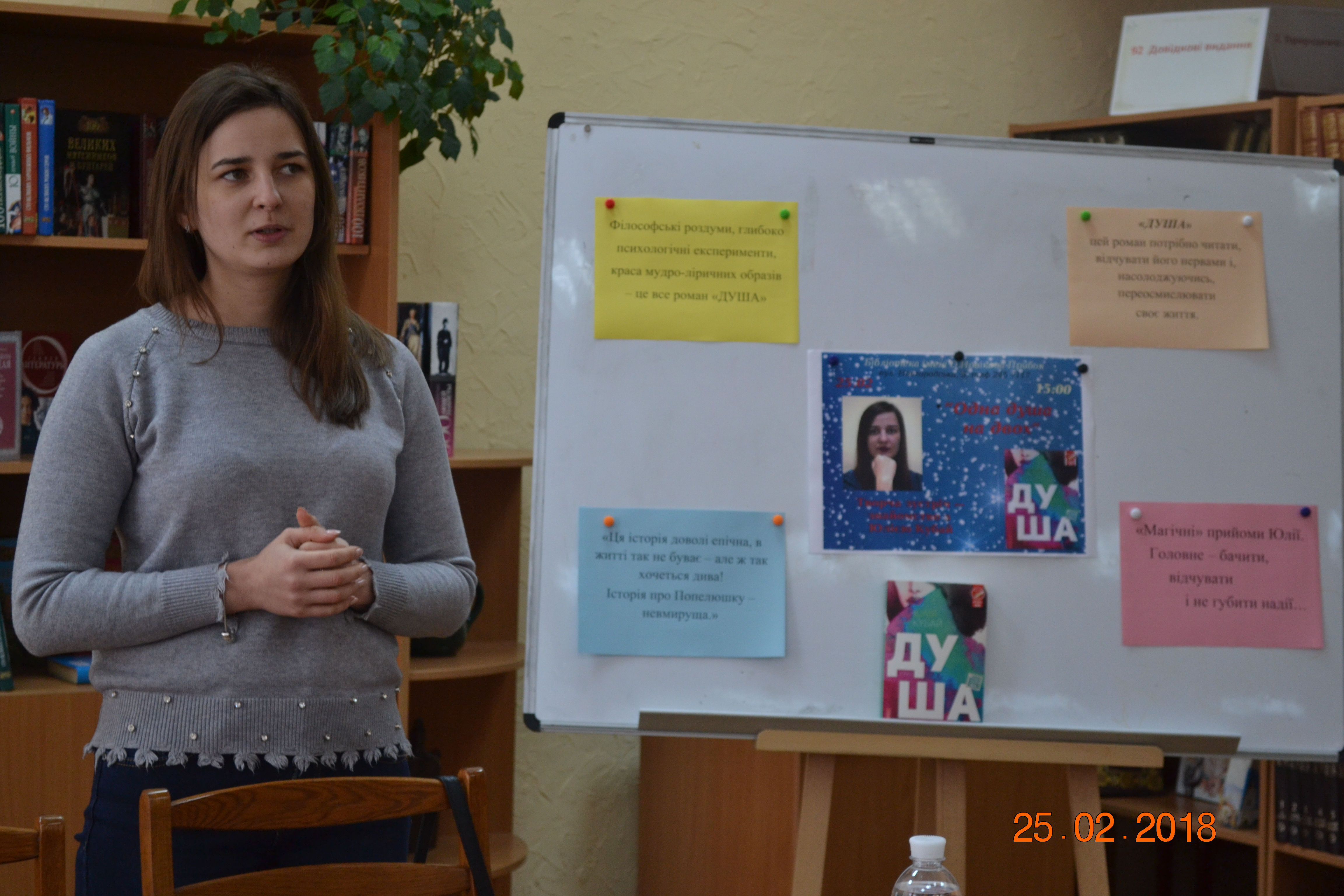 Юлія Кубай в бібліотеці імені О. Новікова-Прибоя (м. Київ)